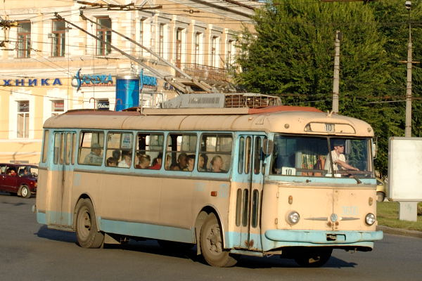 Škoda 9Tr 3600 Simferopol